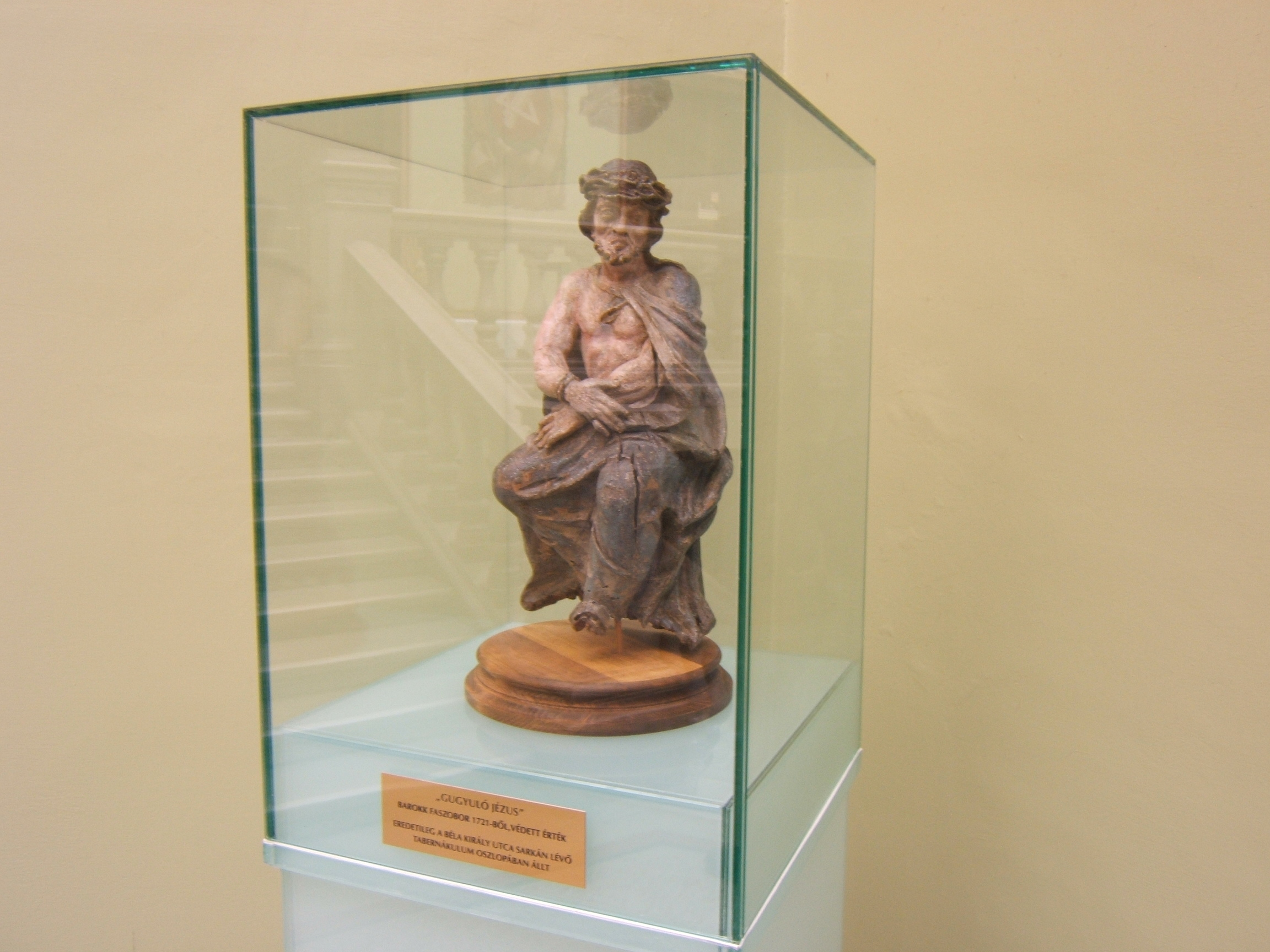 Az eredeti Gugyuló Jézus-szobor a kaposvári Városházán (1721-ből származik)